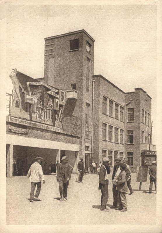 Ростов на Дону проходная Сельмашстрой